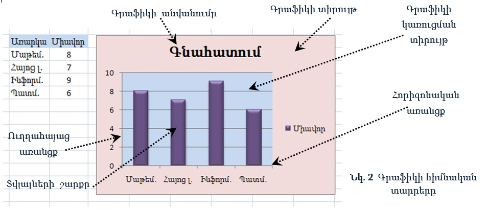 գրաֆիկի կառուցում Excel ում